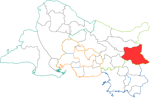 Situation du canton dans le département des Bouches du Rhône (France)